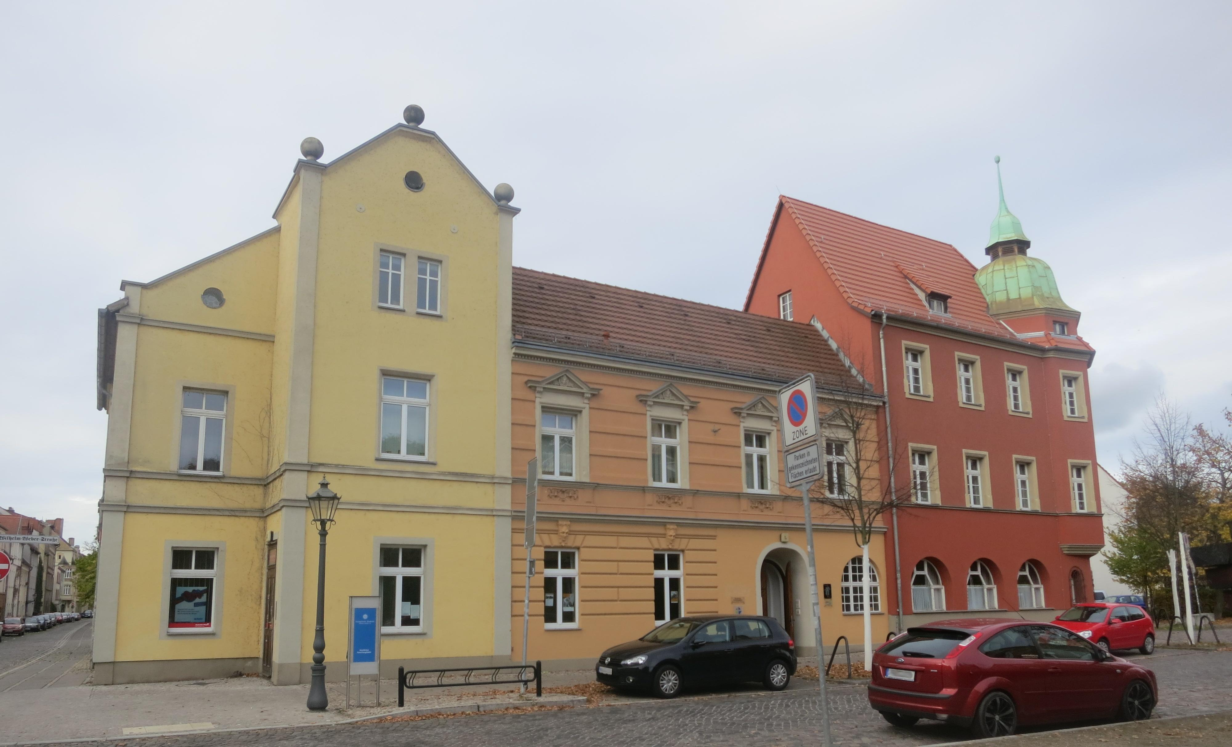 Das Kirchliche Forschungsheim, Wilhelm-Weber-Straße 1a, von der Collegienstraße aus gesehen.